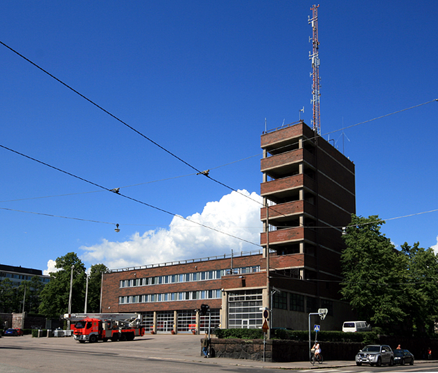 Keskuspelastusasema, Agricolankatu, Helsinki.